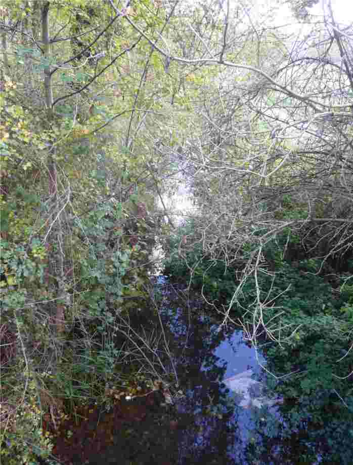 bief en parallèle de l'orge et de la remarde tout au log de la commune d'ollainville